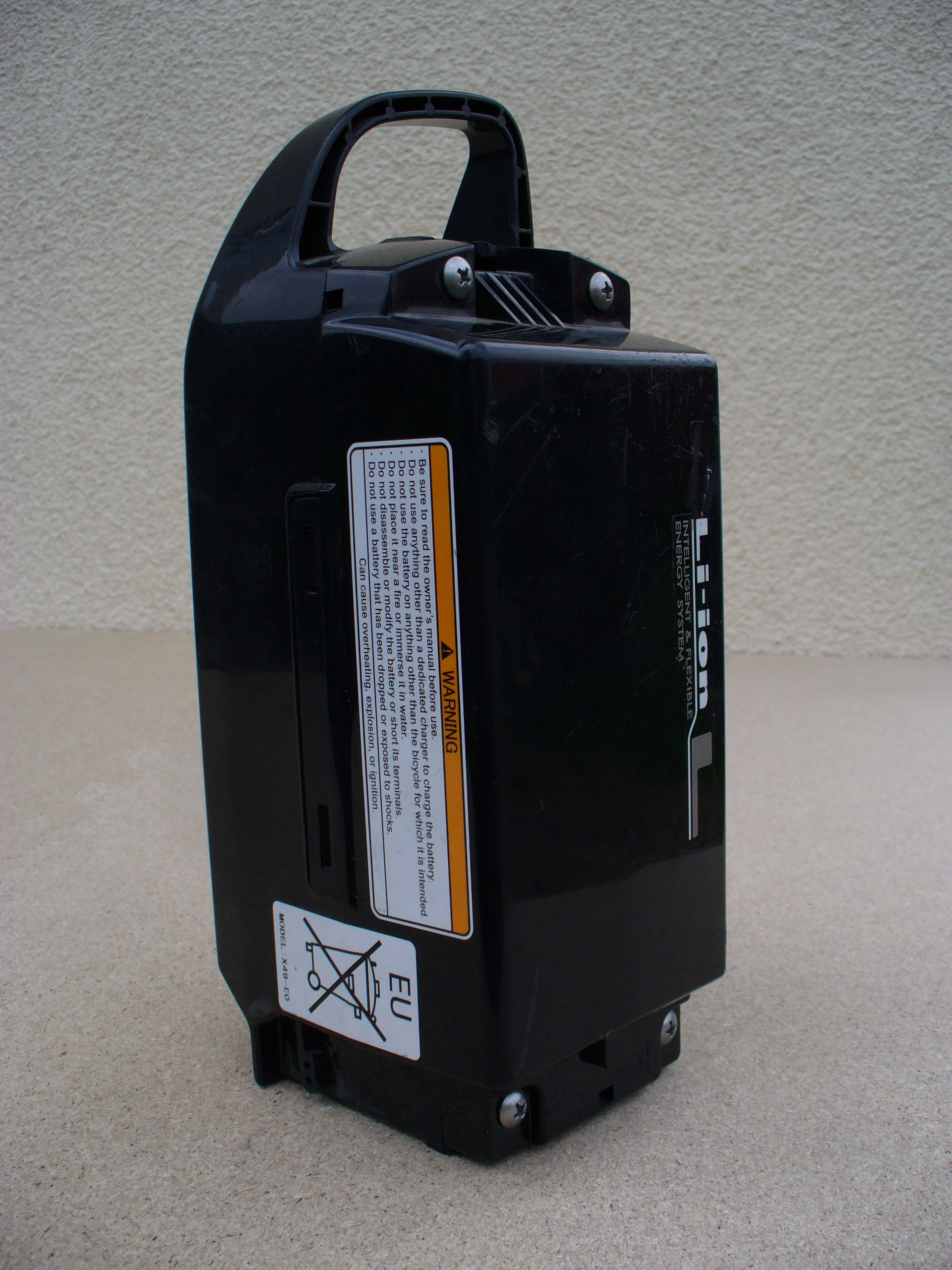 Lithium-Ionen-Akkumulator: Yamaha X60-E0 als Traktionsbatterie für Pedelec mit Yamaha-Mittelmotor, beispielsweise des ungarischen Fahrradherstellers Gepida